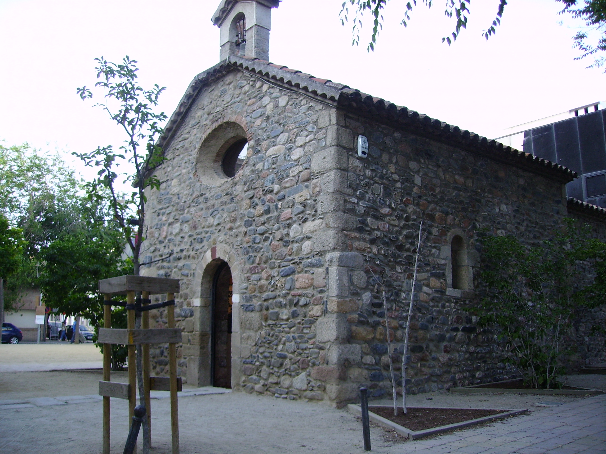 Capella de Sant Corneli i Sant Cebrià, Cardedeu, Vallès Oriental, Catalunya.